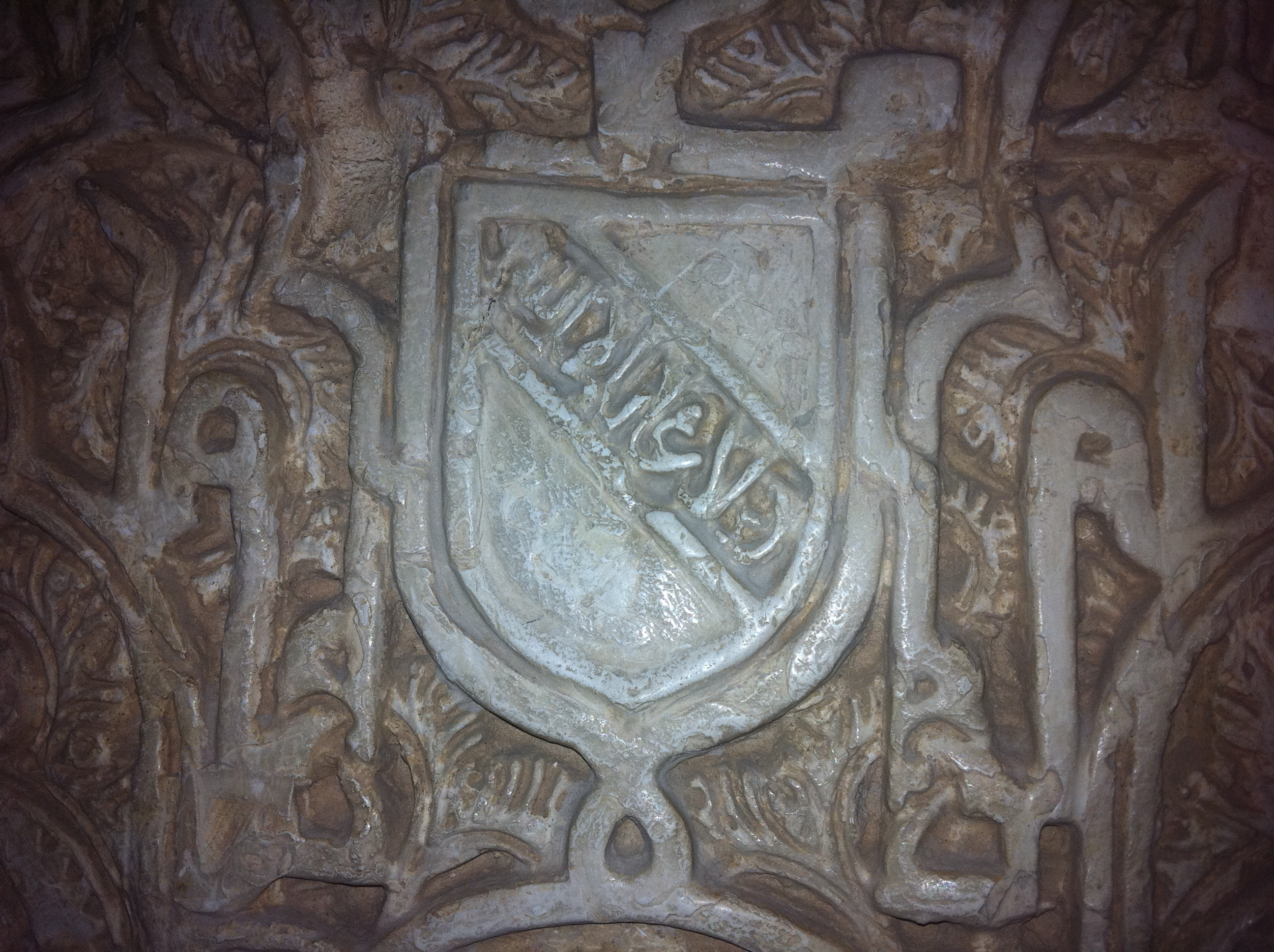 Escudo en interior de la Alhambra, Granada (Spain)